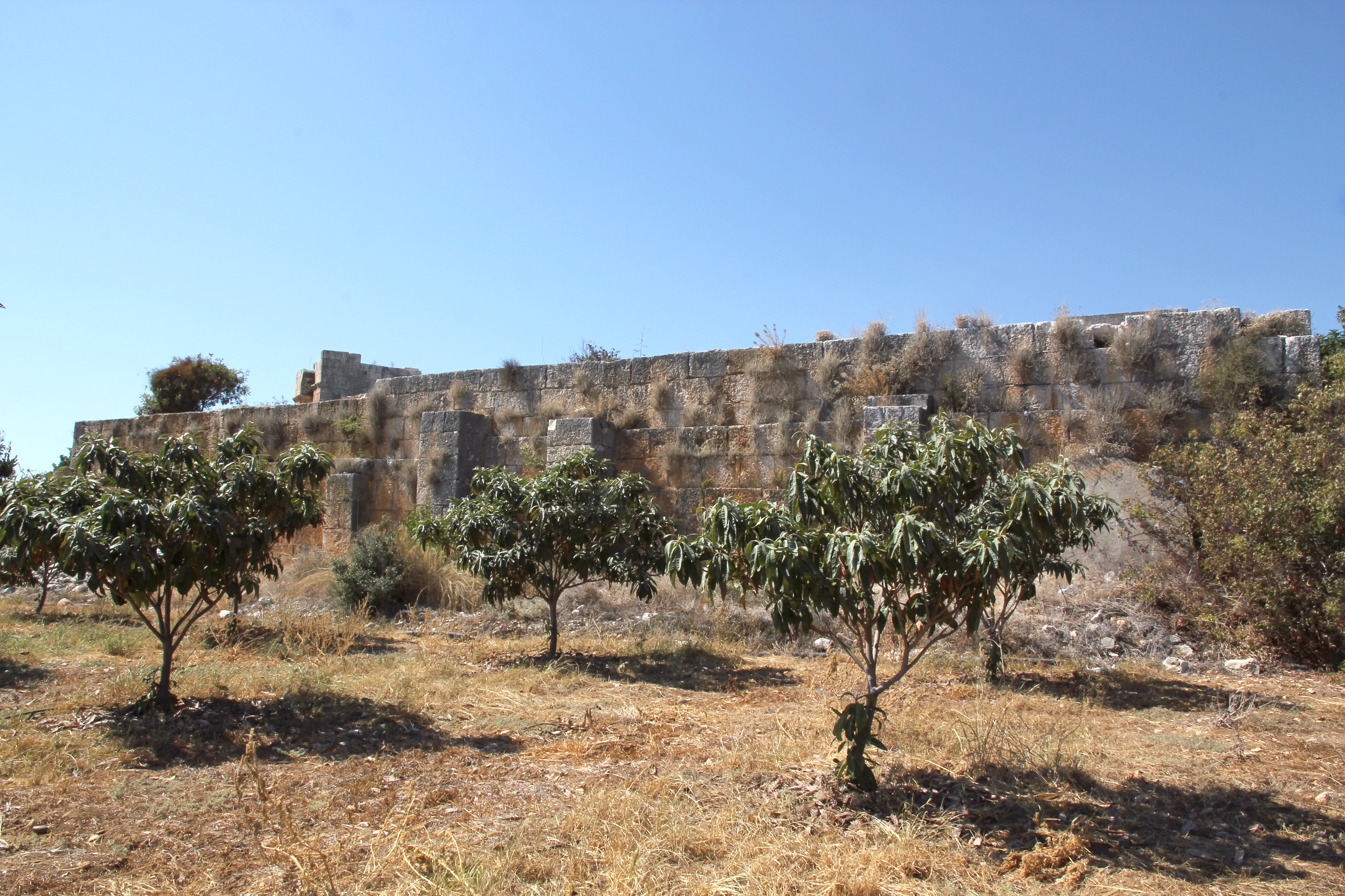 Akkale, byzantinischer Ruinenkomplex bei Kızkalesi, Südtürkei, große Zisterne